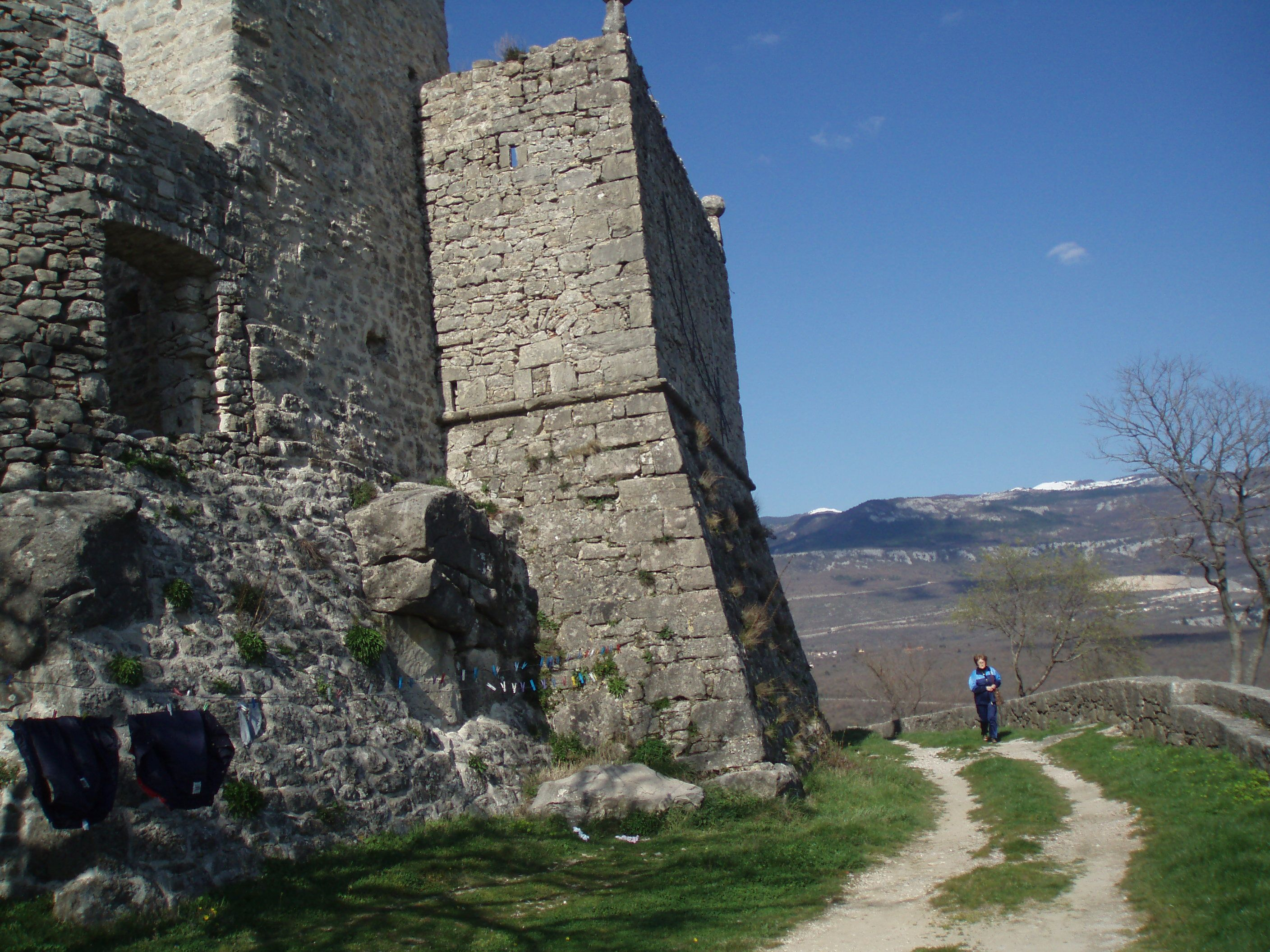 Zidine starog kaštela iznad Boljunčice odakle se pruža pogled na masiv Učke. Na svom vrhuncu je bio od 15. do 17. stoljeća, sa vlastitim sucima, županima i zakonima, i oko 130 obitelji.